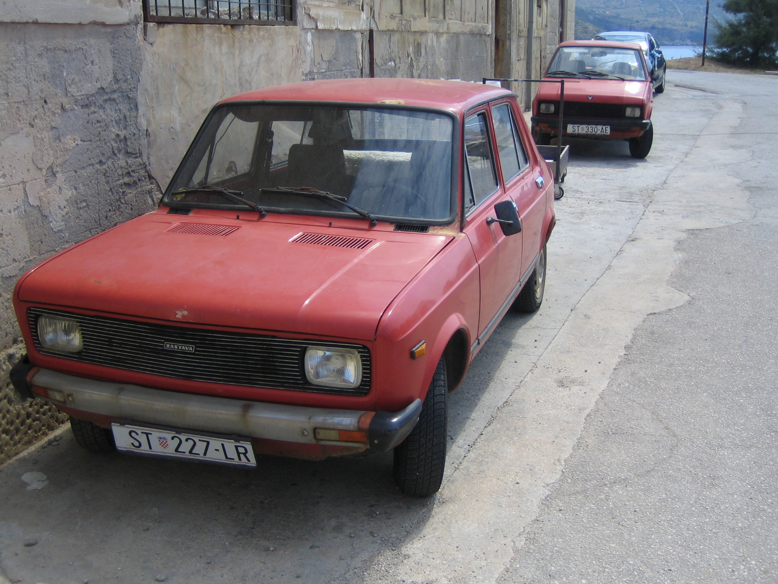 Ein neuerer Zastava 101/Yugo Skala 55